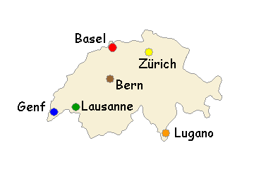 Spielorte der 5. Fußball-Weltmeisterschaft 1954 in der Schweiz Author: Soccerates